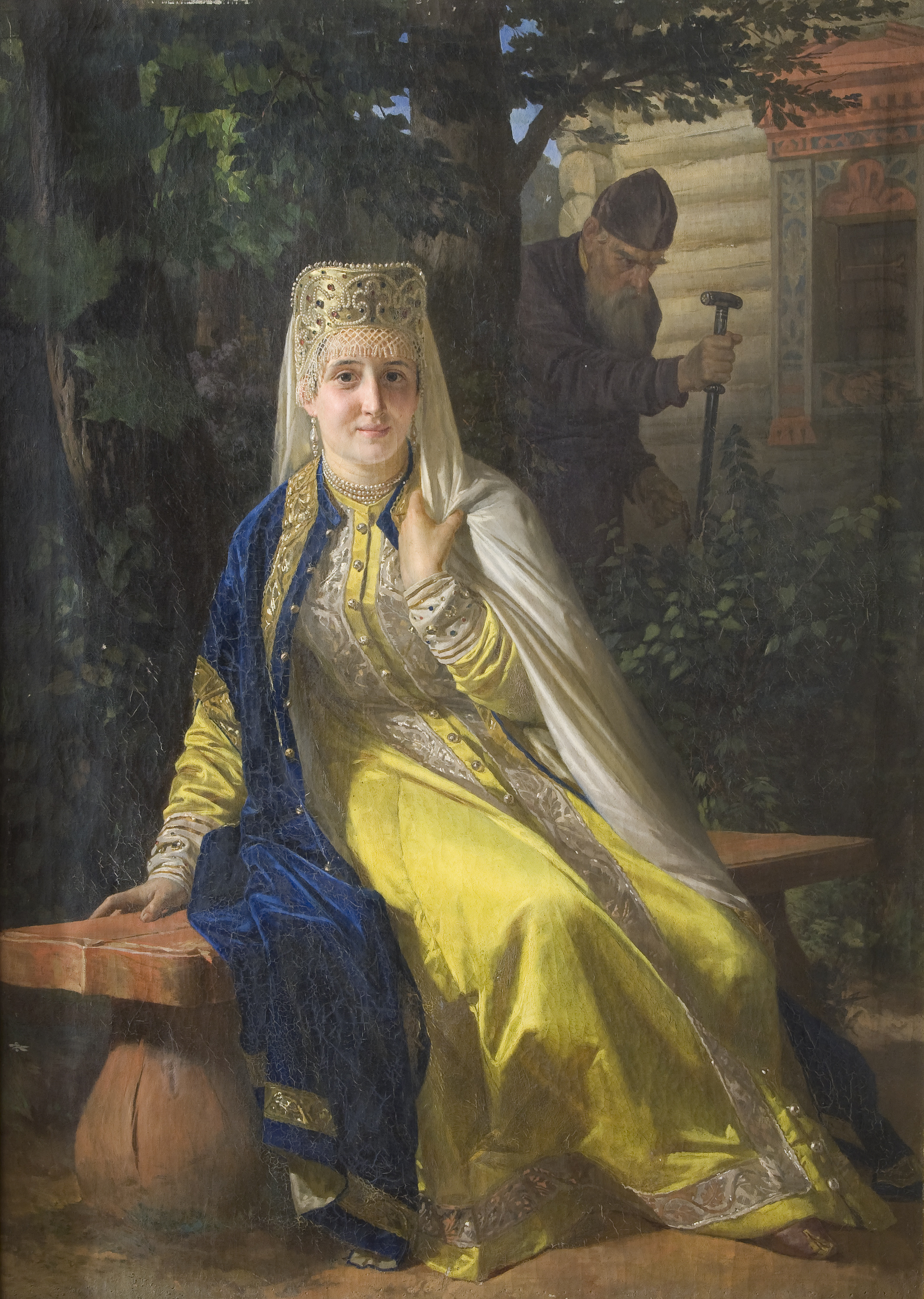 Vasilisa Melentieva (Wassilissa Melentjewa)